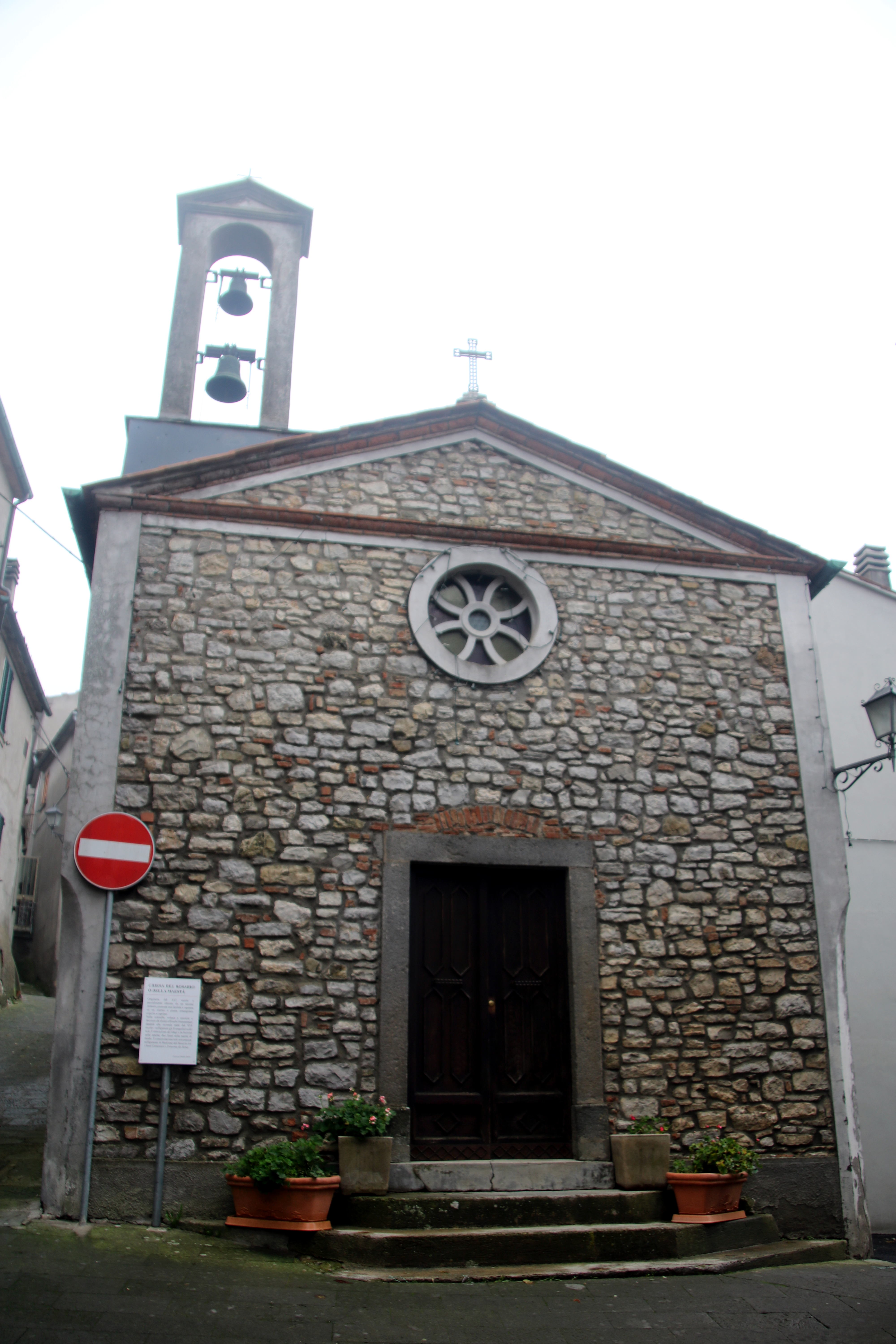 Chiesa della Madonna del Rosario (Castell'Azzara), facciata